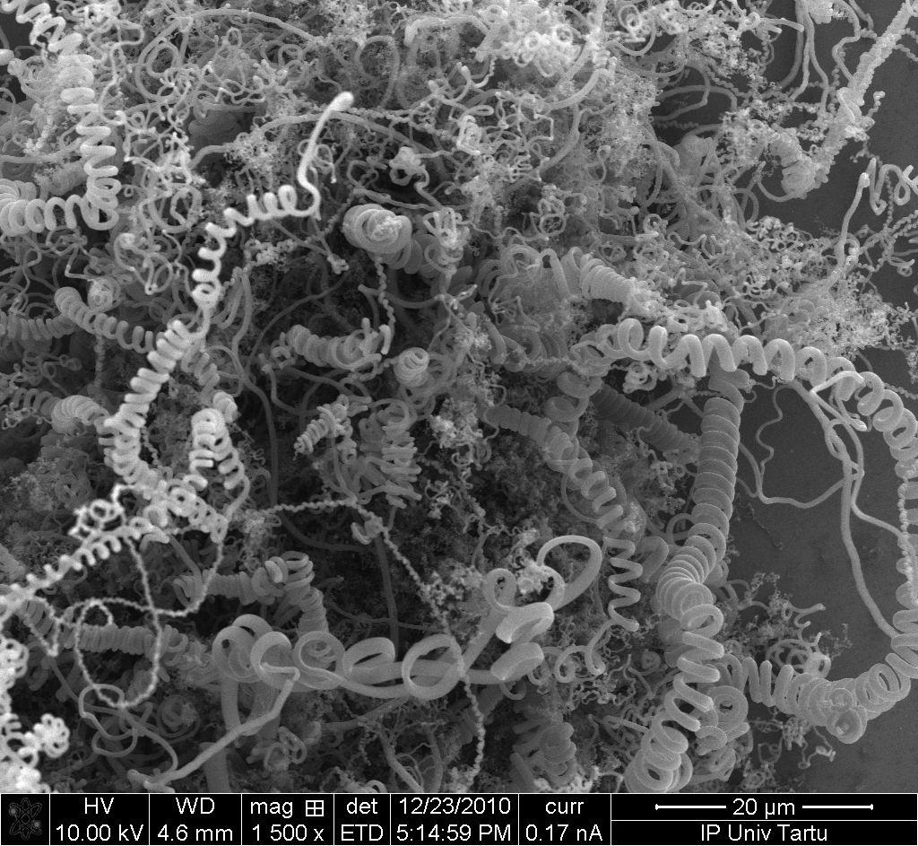 Süsiniknanotorud.See foto võitis Teadusfoto 2011 konkursil Horisondi eripreemia.